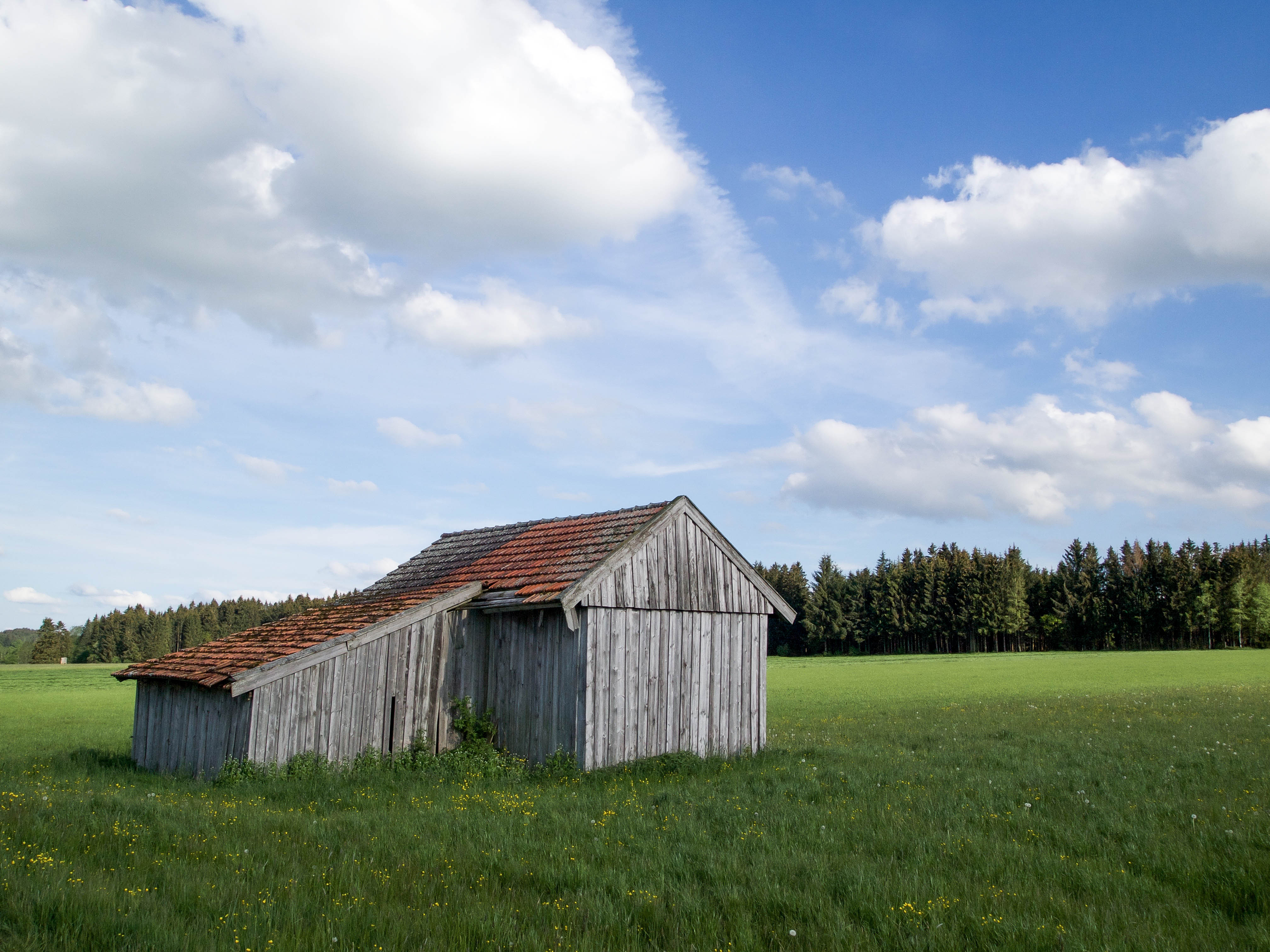 Blick von Norden auf das Waldstück Breites Moos bei Apfeldorf, Oberbayern. (LSG:BY-LSG-00011.01)_Inschutznahme des Breiten Mooses, Gemeinde Apfeldorf und Birkland unter Landschaftsschutz